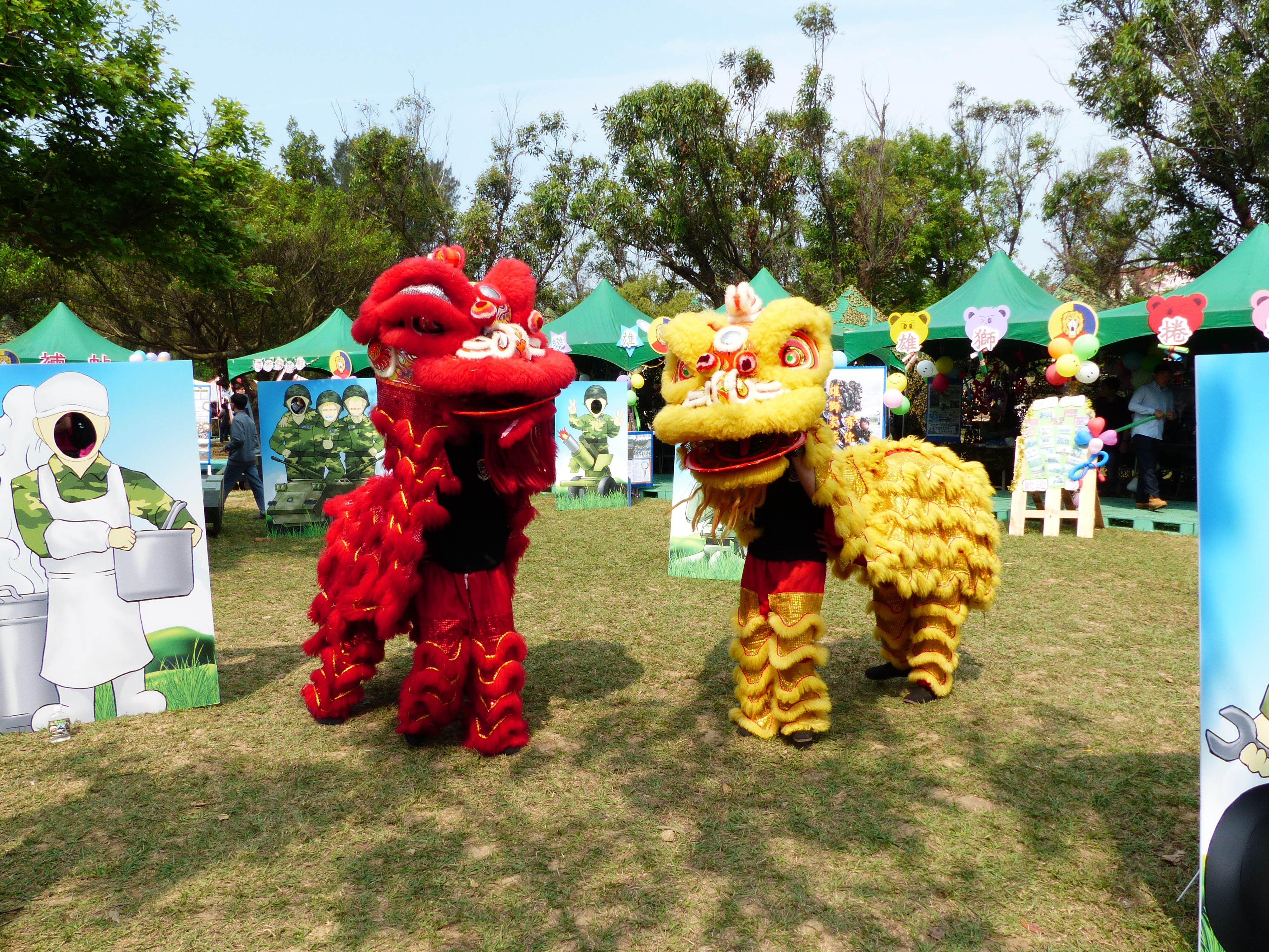 2014年湖口營區開放活動，園遊會中的舞獅。